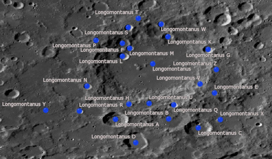 Cráter lunar Longomontanus. Cráteres satélite. (Imagen LRO)